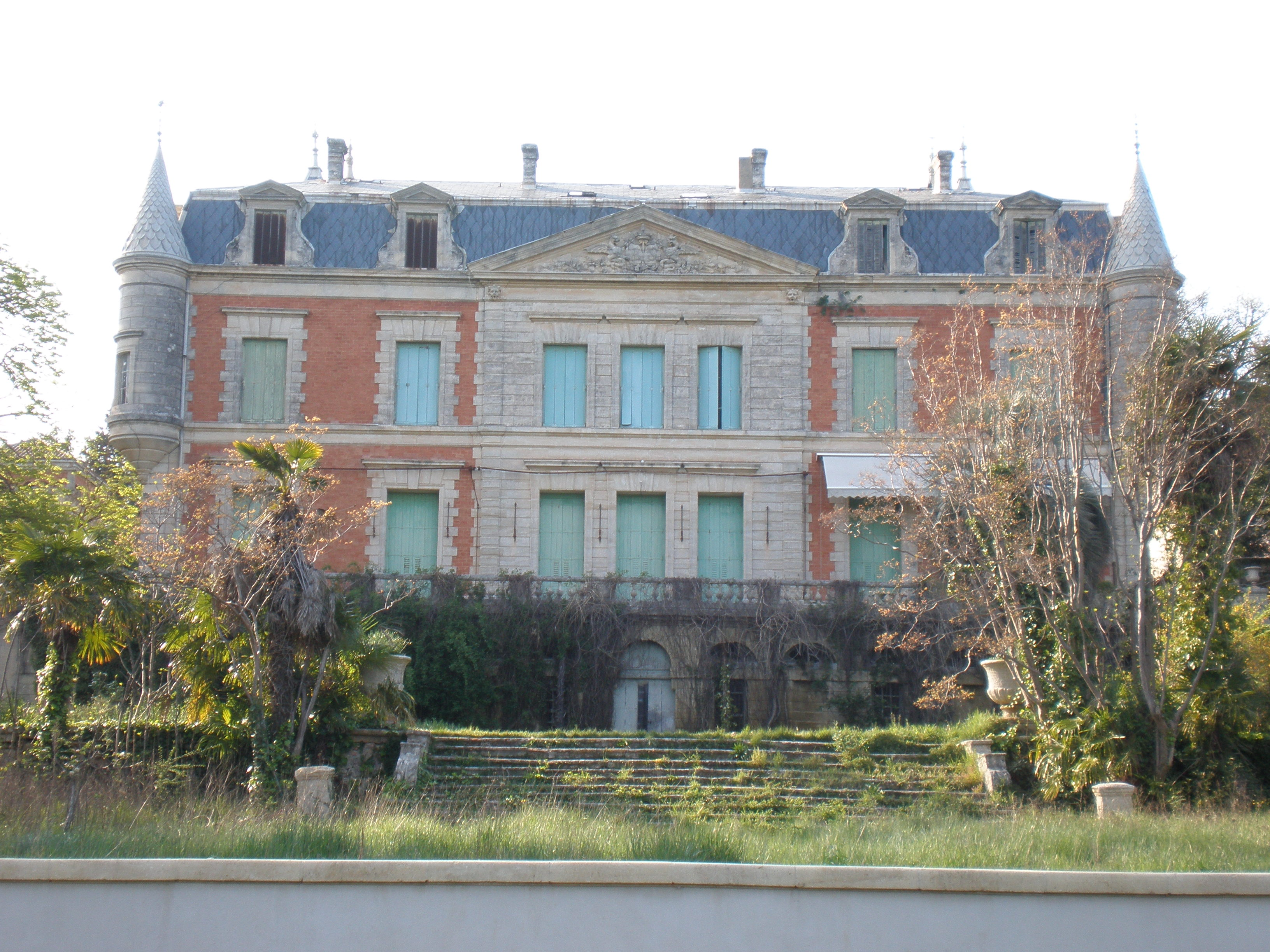 Le Château Bon à Montpellier (Hérault - 34)